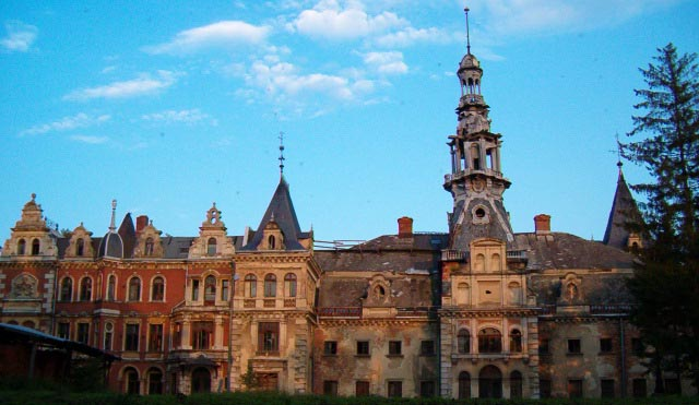 Pałac w Krowiarkach